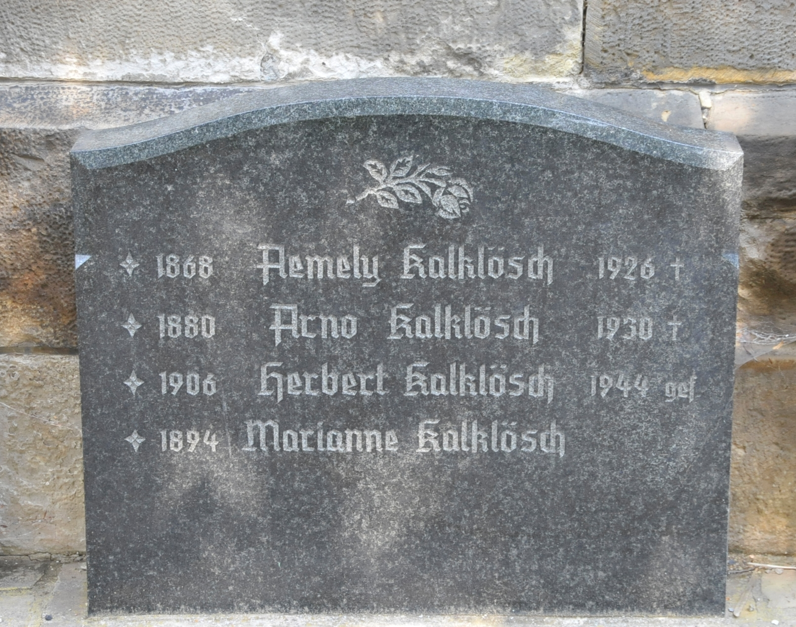 Grabstein von Arno Kalklösch auf dem Friedhof von Wechmar